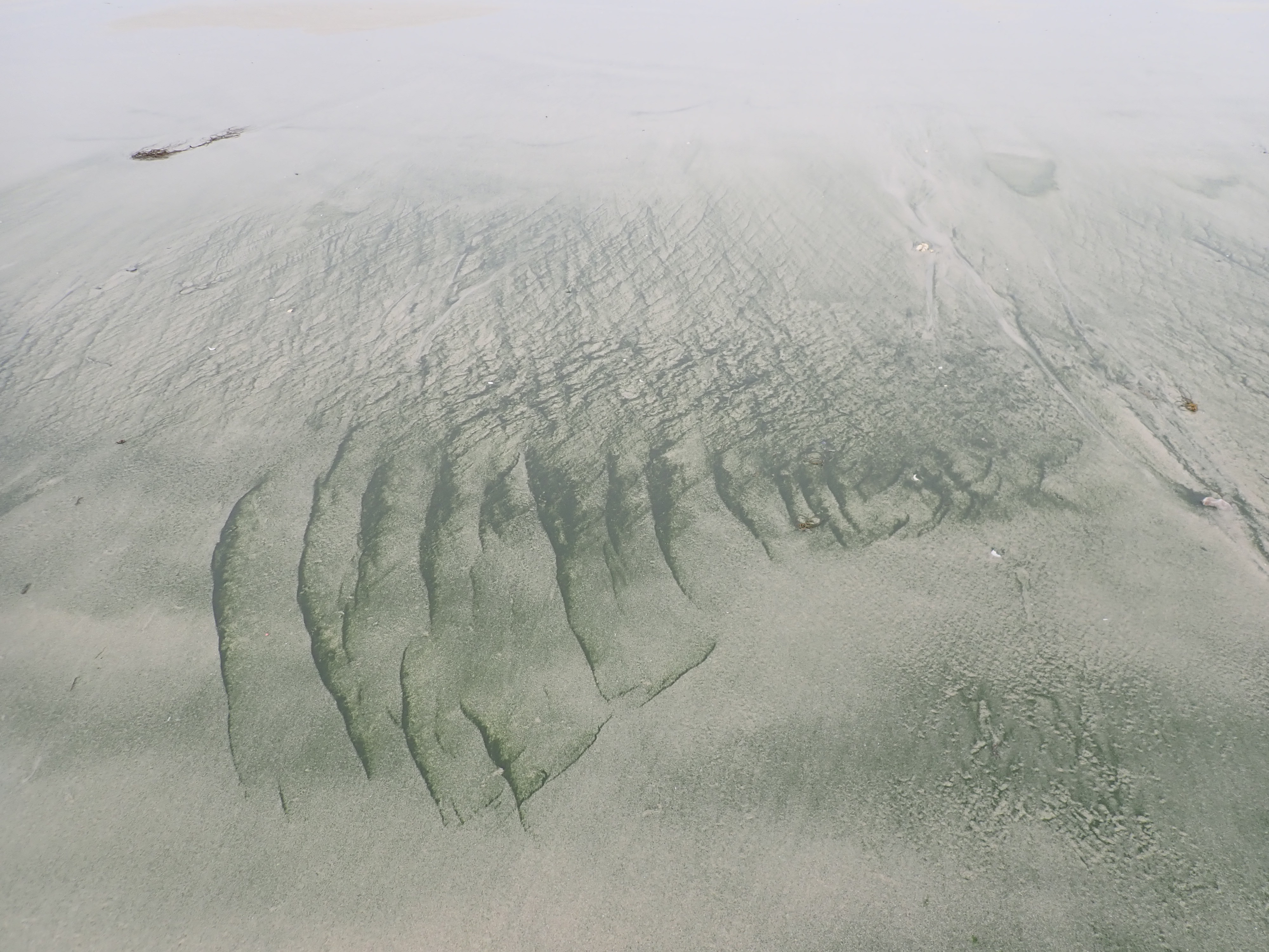 Vue générale